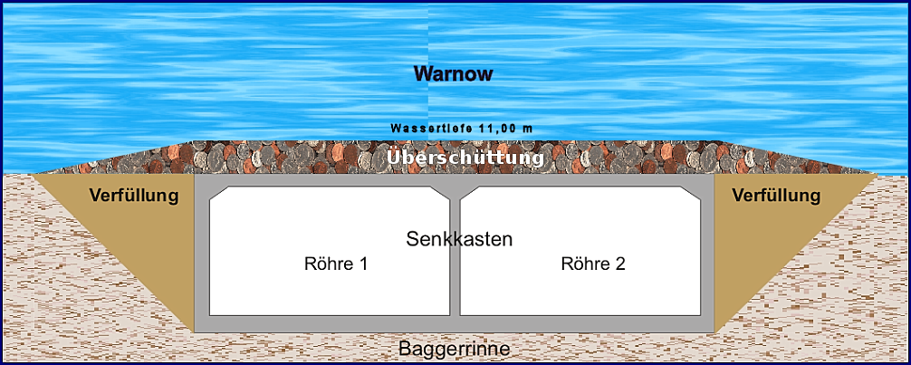 Warnowtunnel Rostock, Querschnitt